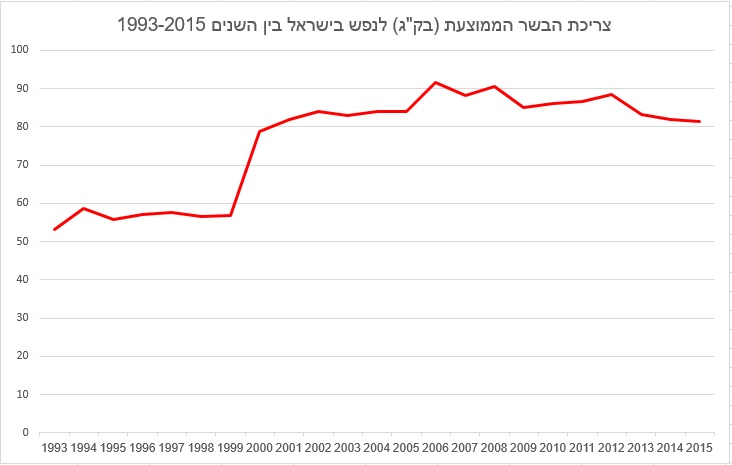 טבלת צריכת בשר בישראל - מידע מתוך אתר ארגון OECD